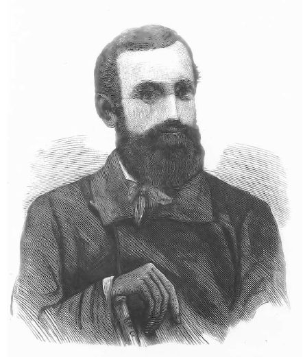 Edmund Bojanowski (1814–1871). Rys. wg czasopisma „Sobótka” 1871, wykonany na podstawie oryginalnej fotografii